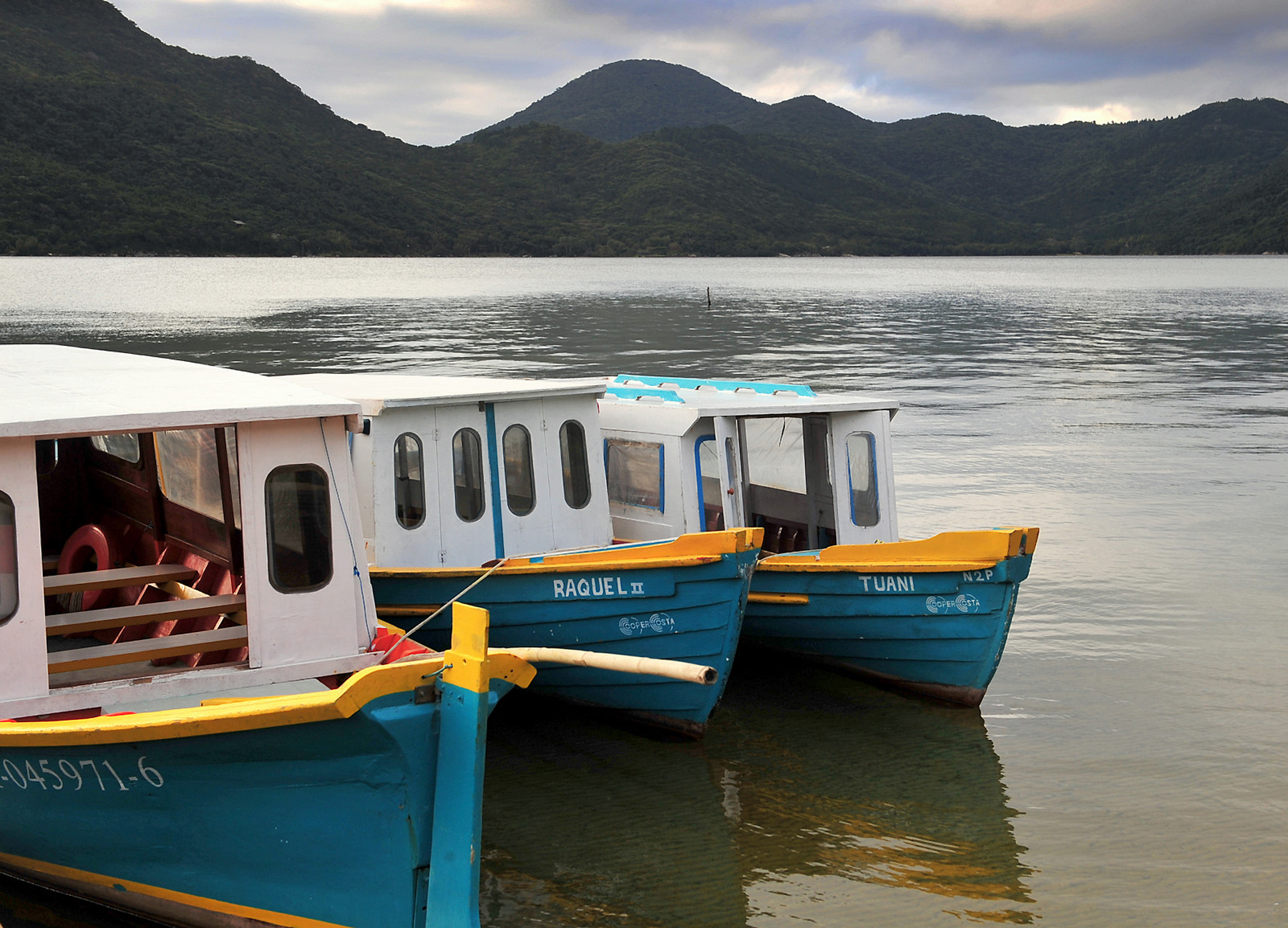 Este terminal de barcos fica dentro do Parque Est. do Rio Vermelho. Transporta turista para o Costaão da Lagoa da Conceição